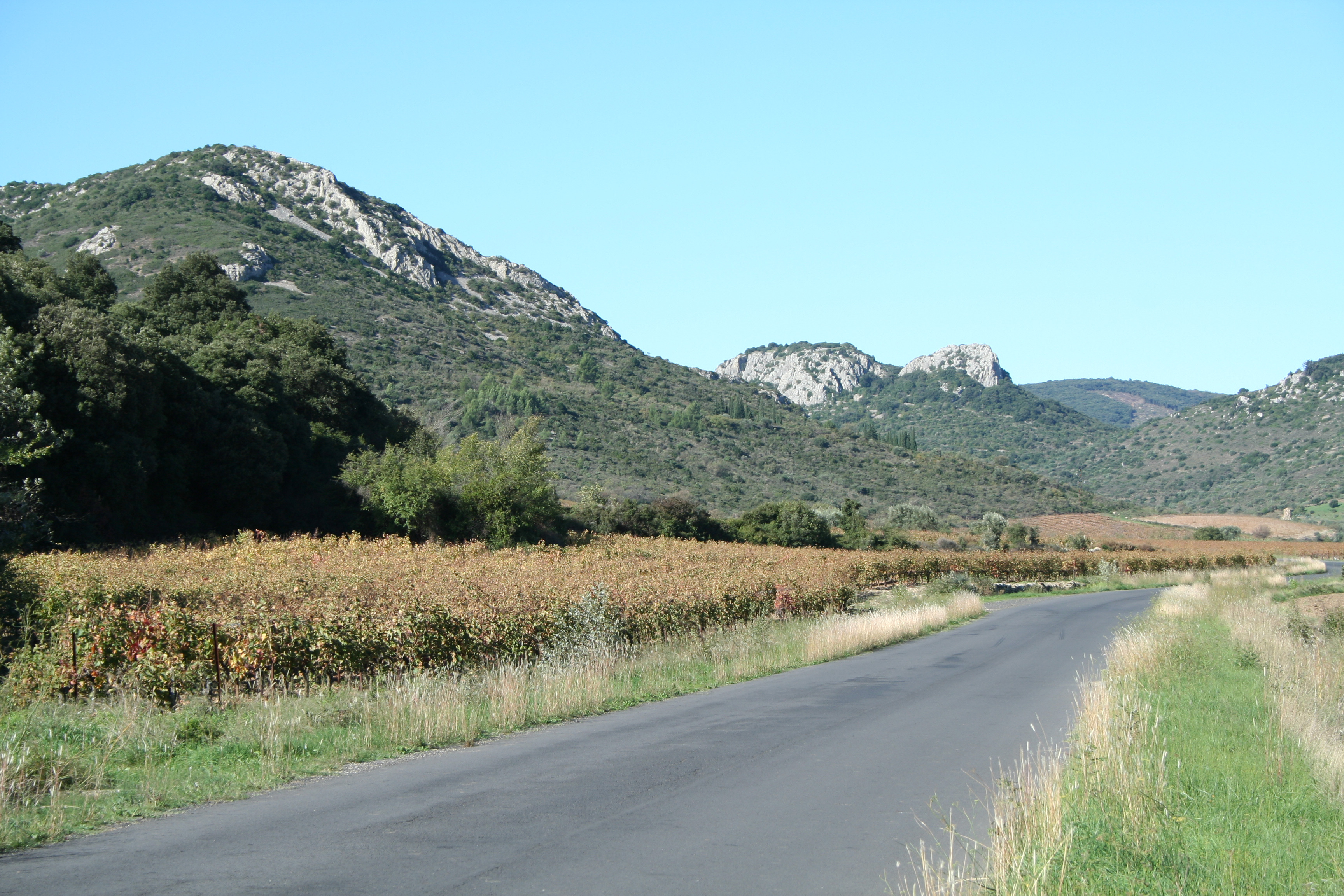 Cabrières (Hérault) - Site du château de Cabrières (mentionné par Grégoire de Tours).